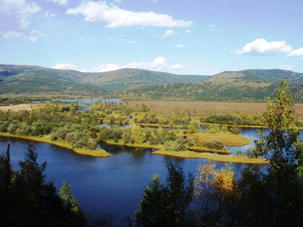 Тумнин